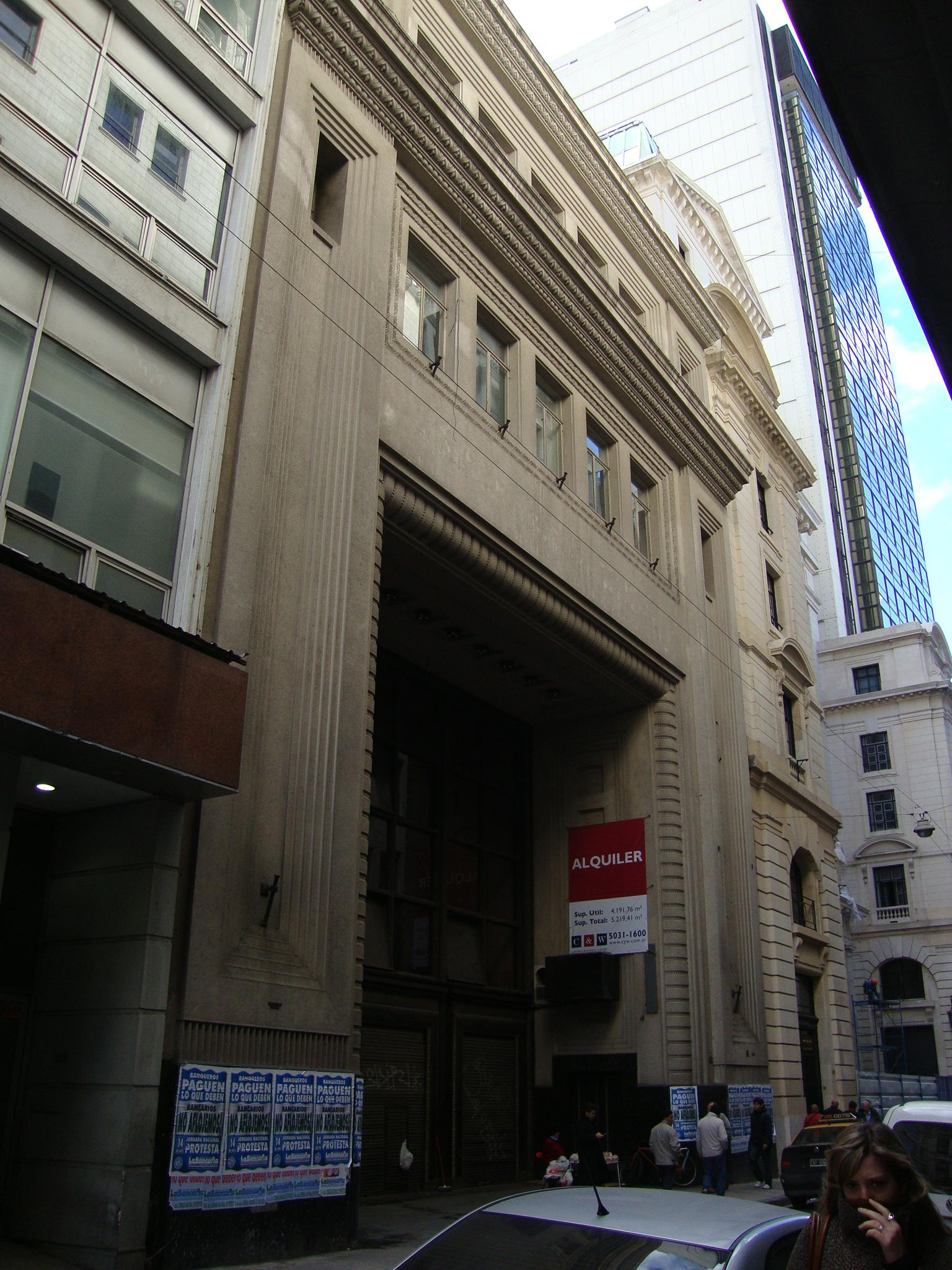 Edificio del Banco El Hogar Argentino (propiedad del Grupo Santander), cerrado y en alquiler. Ubicado en Bartolomé mitre 575. Buenos Aires, Argentina.